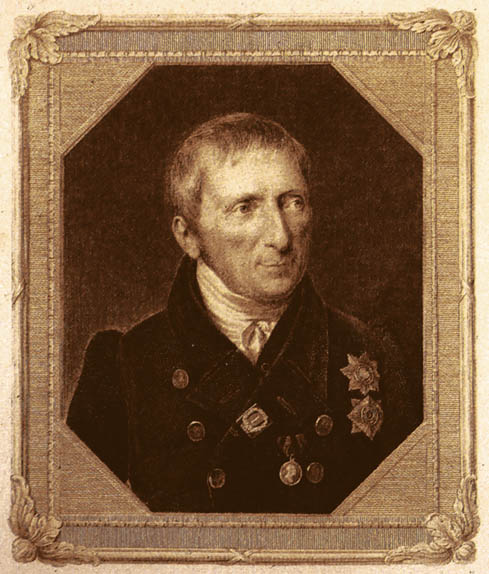 Portrait of Alexei Olenin